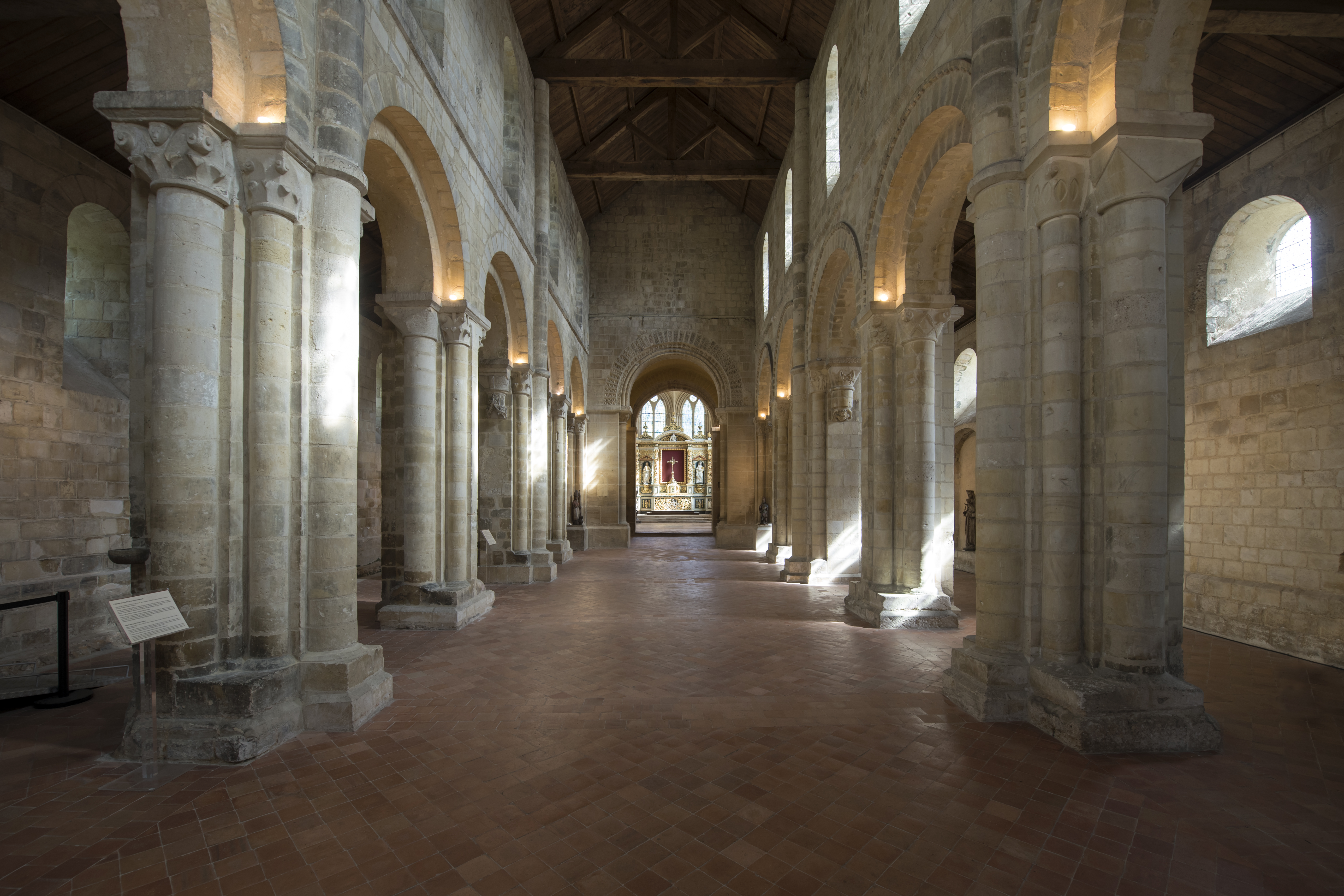 Prieuré de Graville, Le Havre, 2017. .